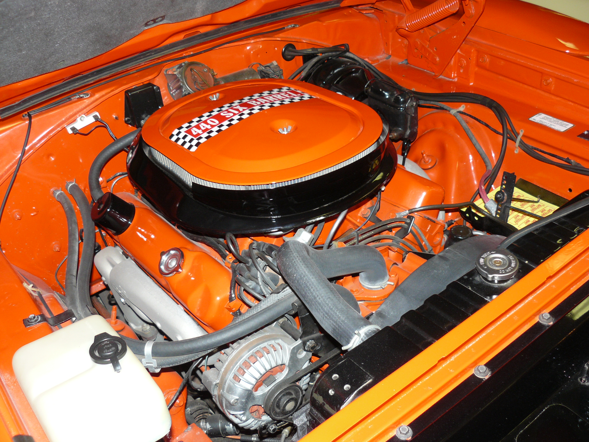 Musée de Canton